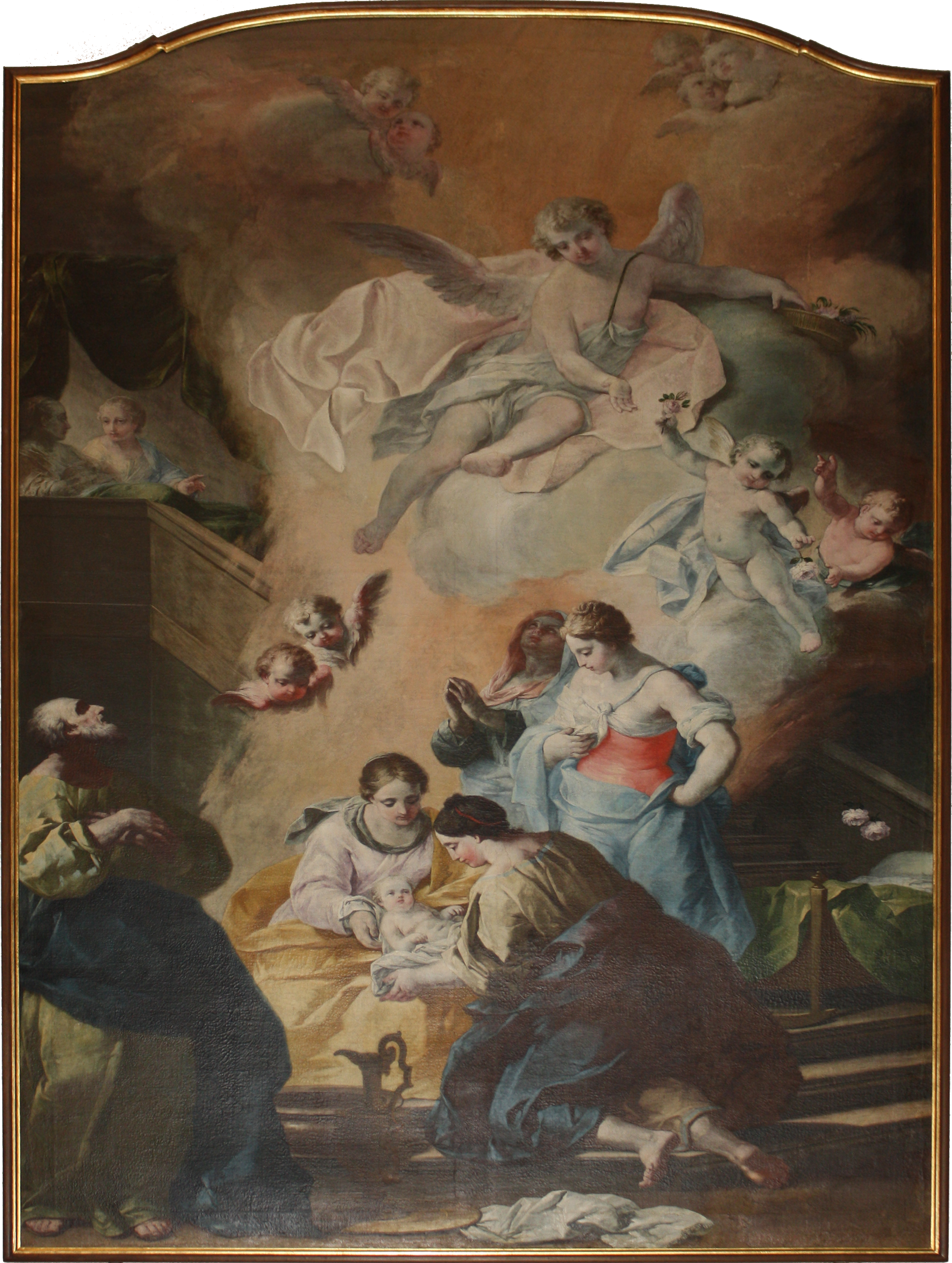 Dipinto olio su tela raffigurante la Nascita di Maria, opera di Biagio Bellotti del 1765-1770 conservata presso la chiesa di San Martino di Carnago (VA), insieme all'opera Presentazione di Gesù al Tempio.